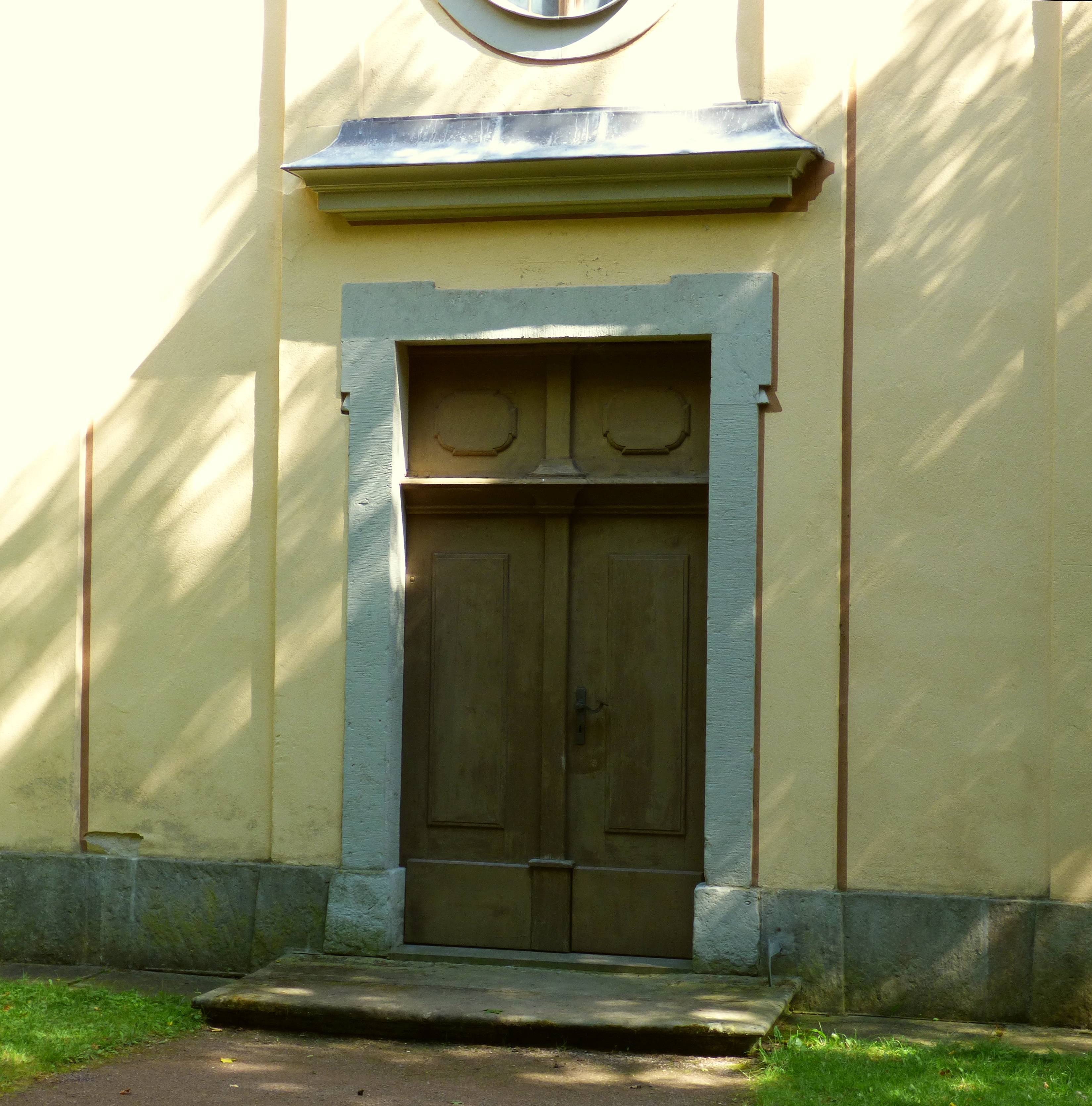 Portal an der Schlosskirche Tiefenau